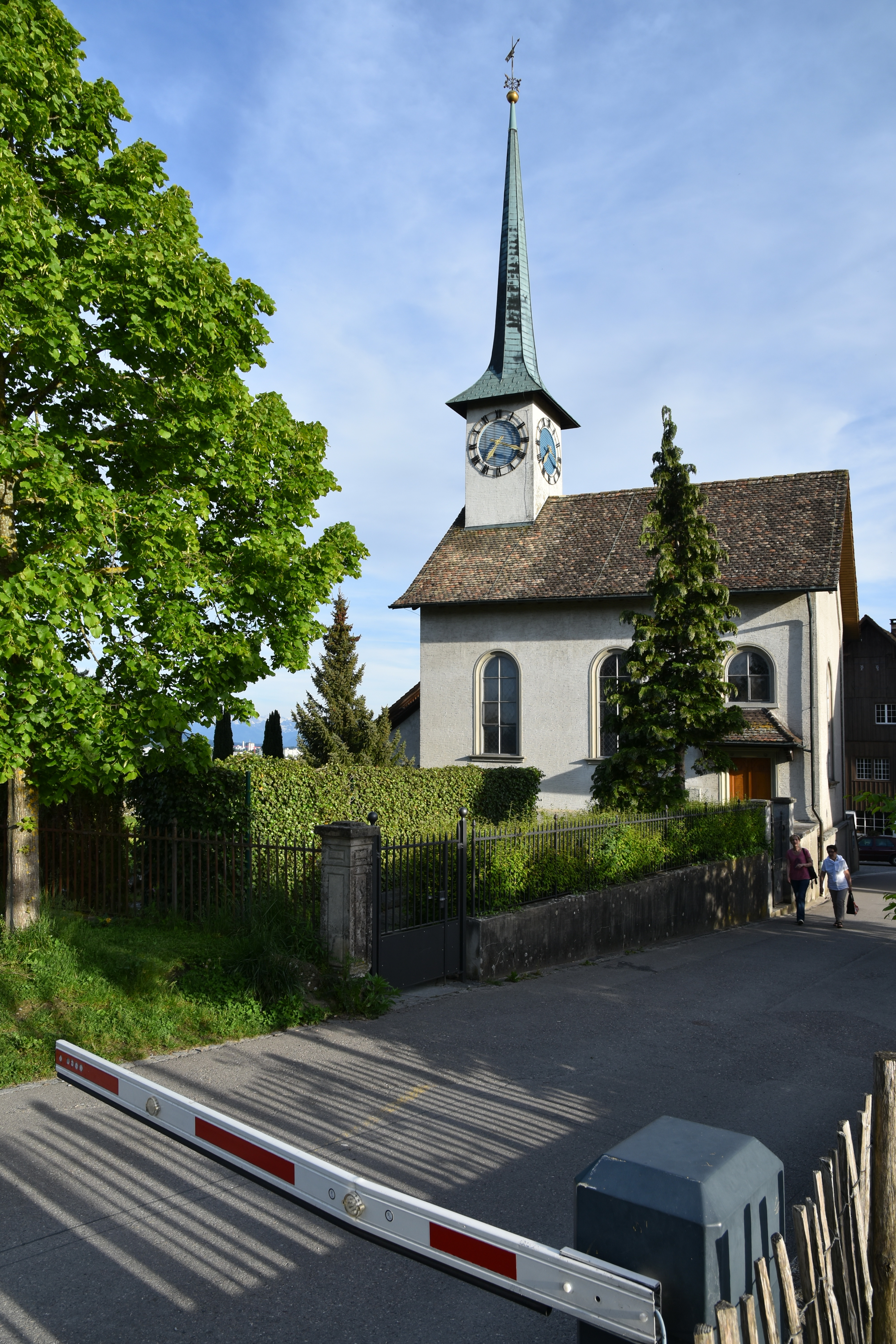 Reformierte Kirche Seegräben as seen from Jucker Farm in Seegräben (Switzerland)